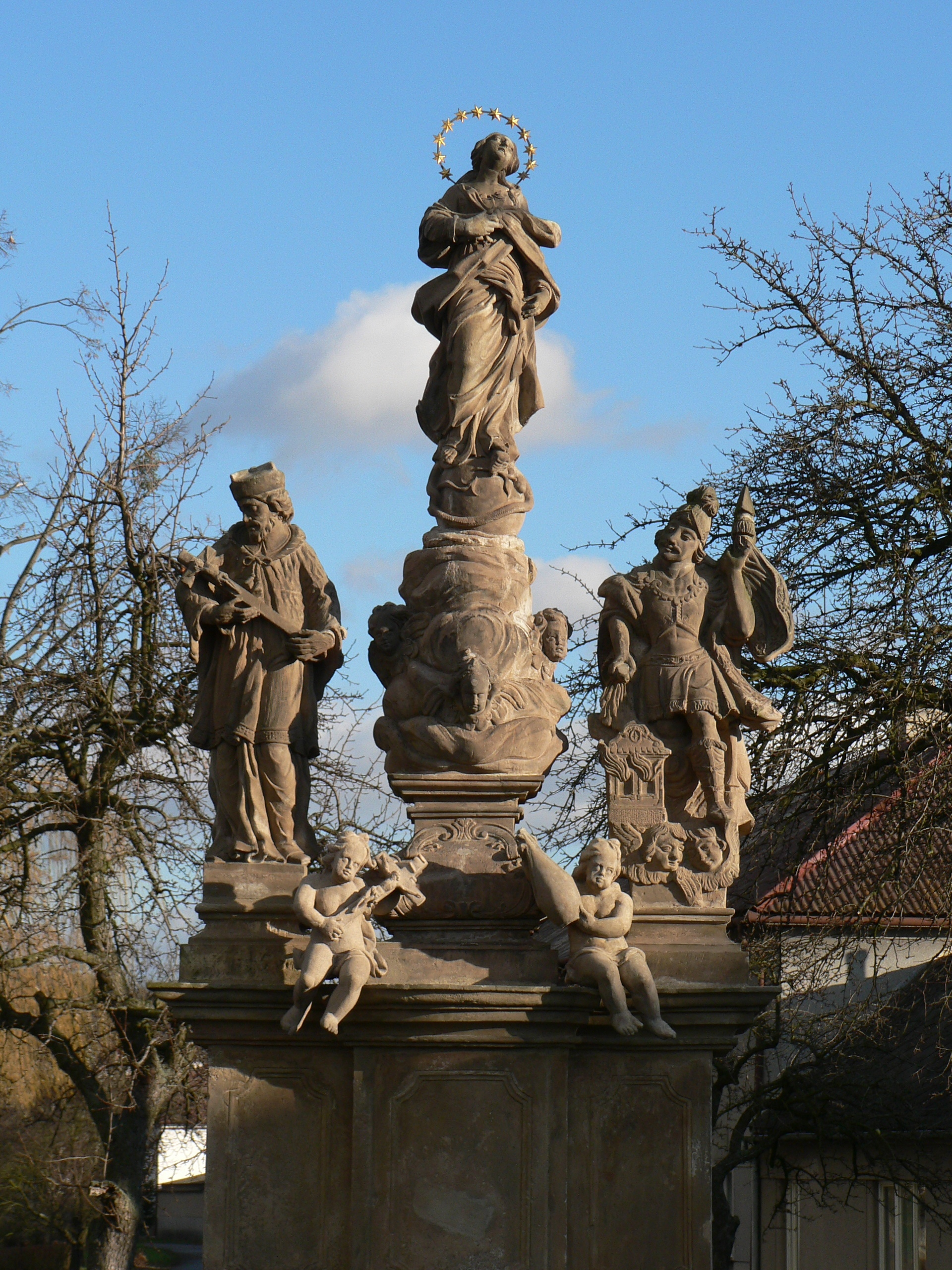 Barokní sousoší Panny Marie, svatého Floriána a svatého Jana Nepomuckého z poloviny 18. století (Moravičany)